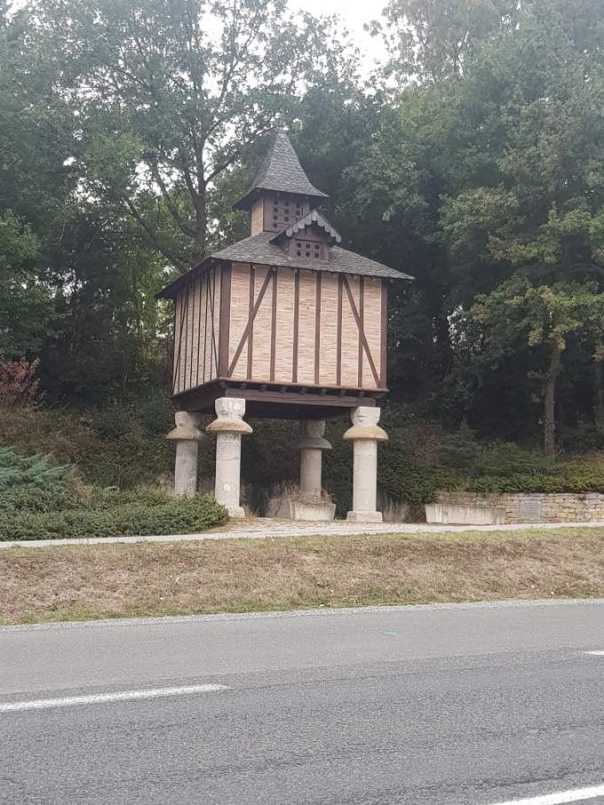 Pigeonnier de Lescout